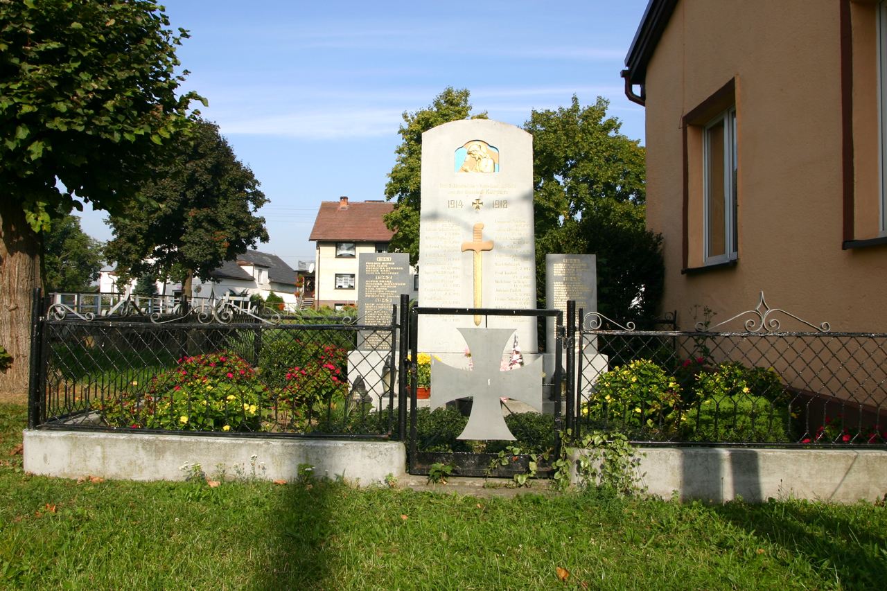 Kierpień (dodatkowa nazwa w j. niem. Kerpen) – wieś w Polsce położona w województwie opolskim, w w powiecie prudnickim, w gminie Głogówek.